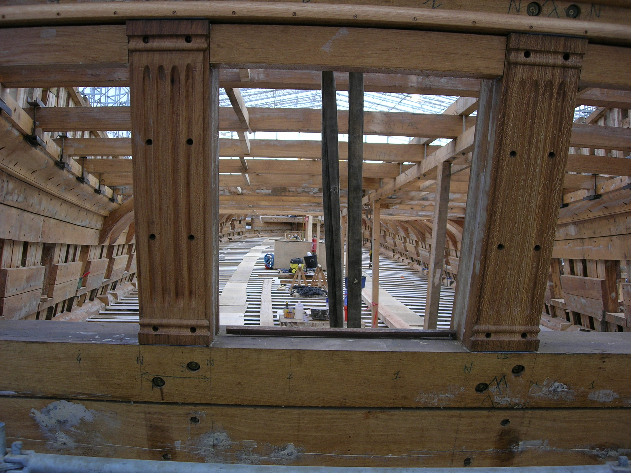 Reconstruction de l'Hermione a rochefort (France)